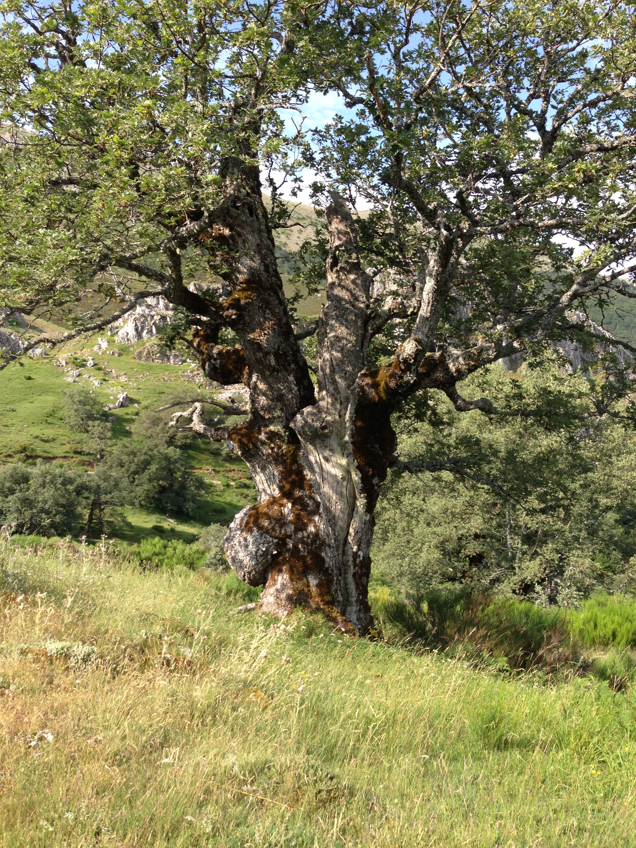 Roblón centenario (Quercus pyrenaica)